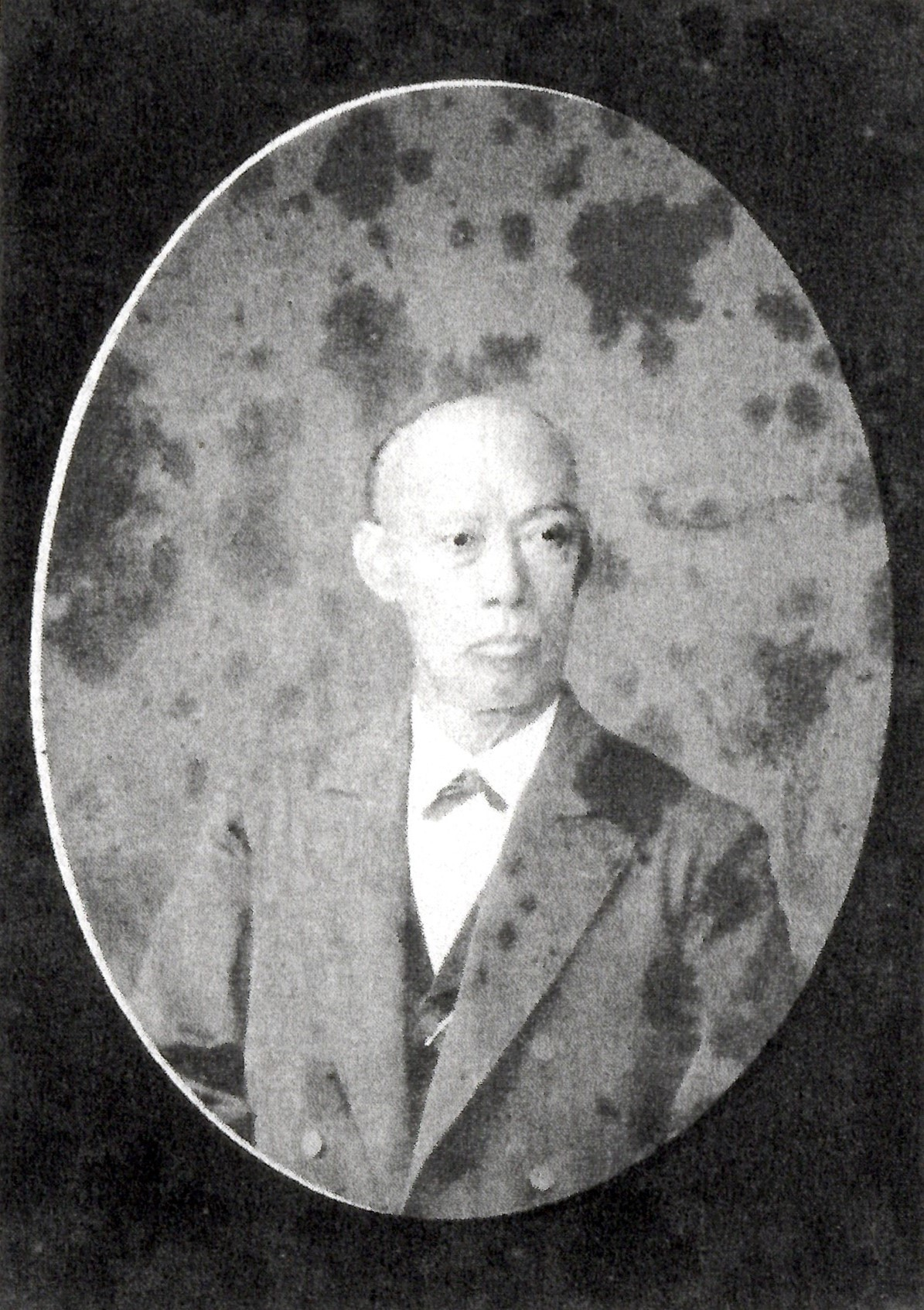 伊達宗孝の肖像写真。